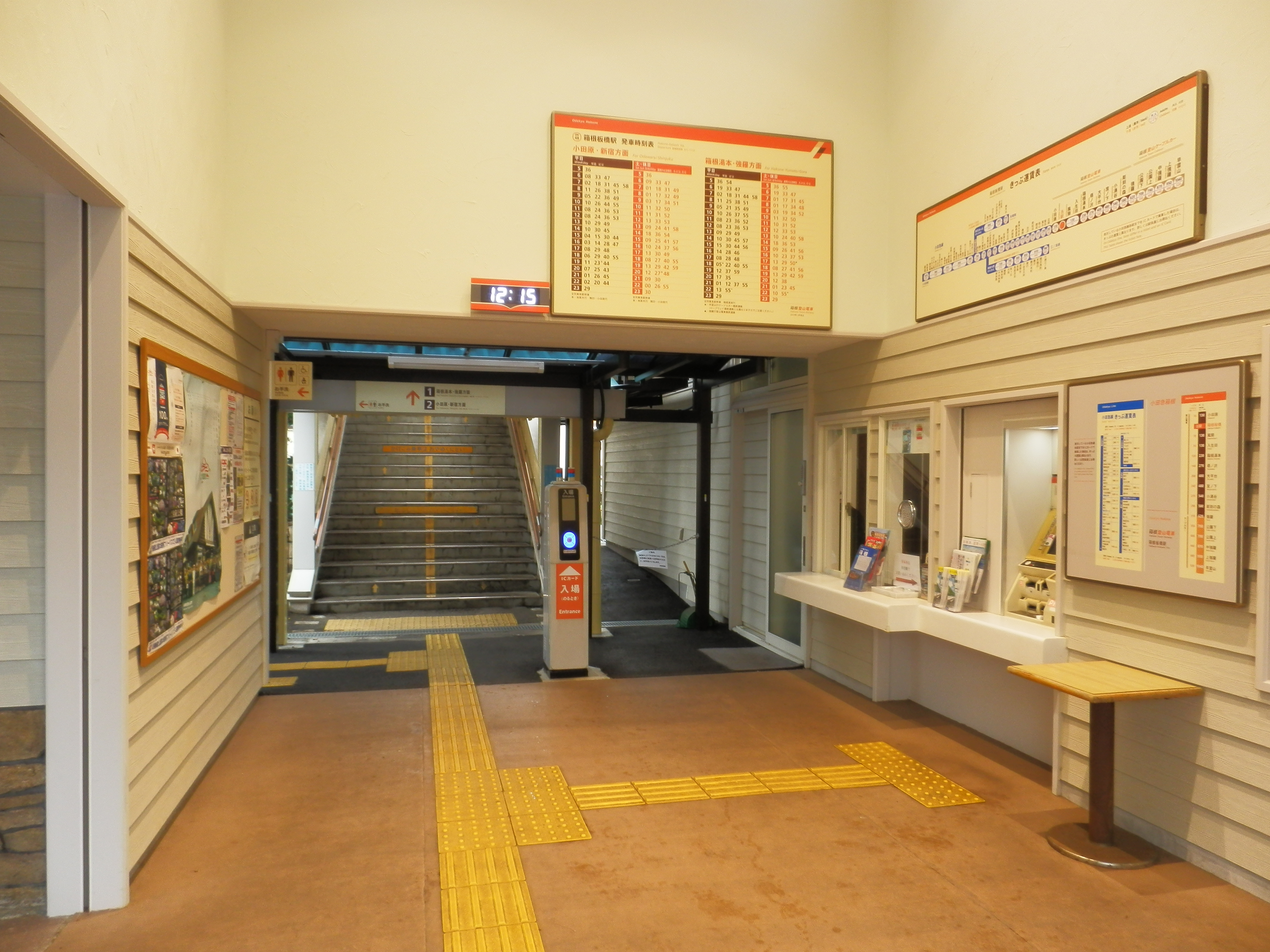 箱根板橋駅改札